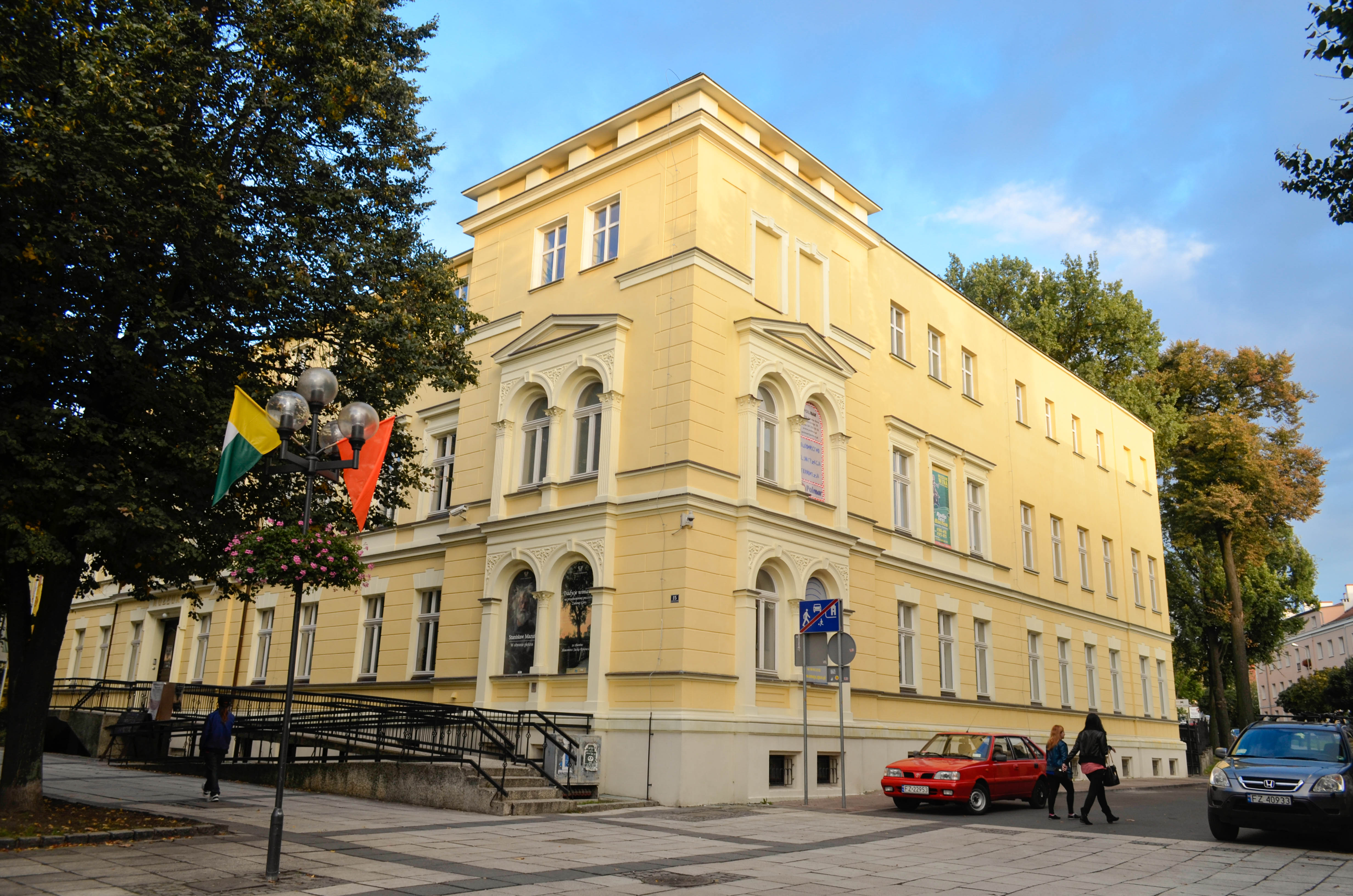 Zielona Góra, dom, ob. Muzeum Okręgowe, XIX